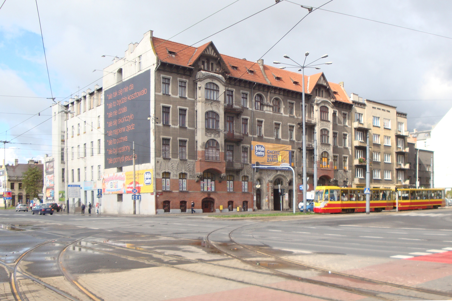 Łódź, kamienica Zygmunta Dejczmana, 1902–1903, 1911–1912, secesja, stan 23 września 2013 r. przed przebudową al. Mickiewicza